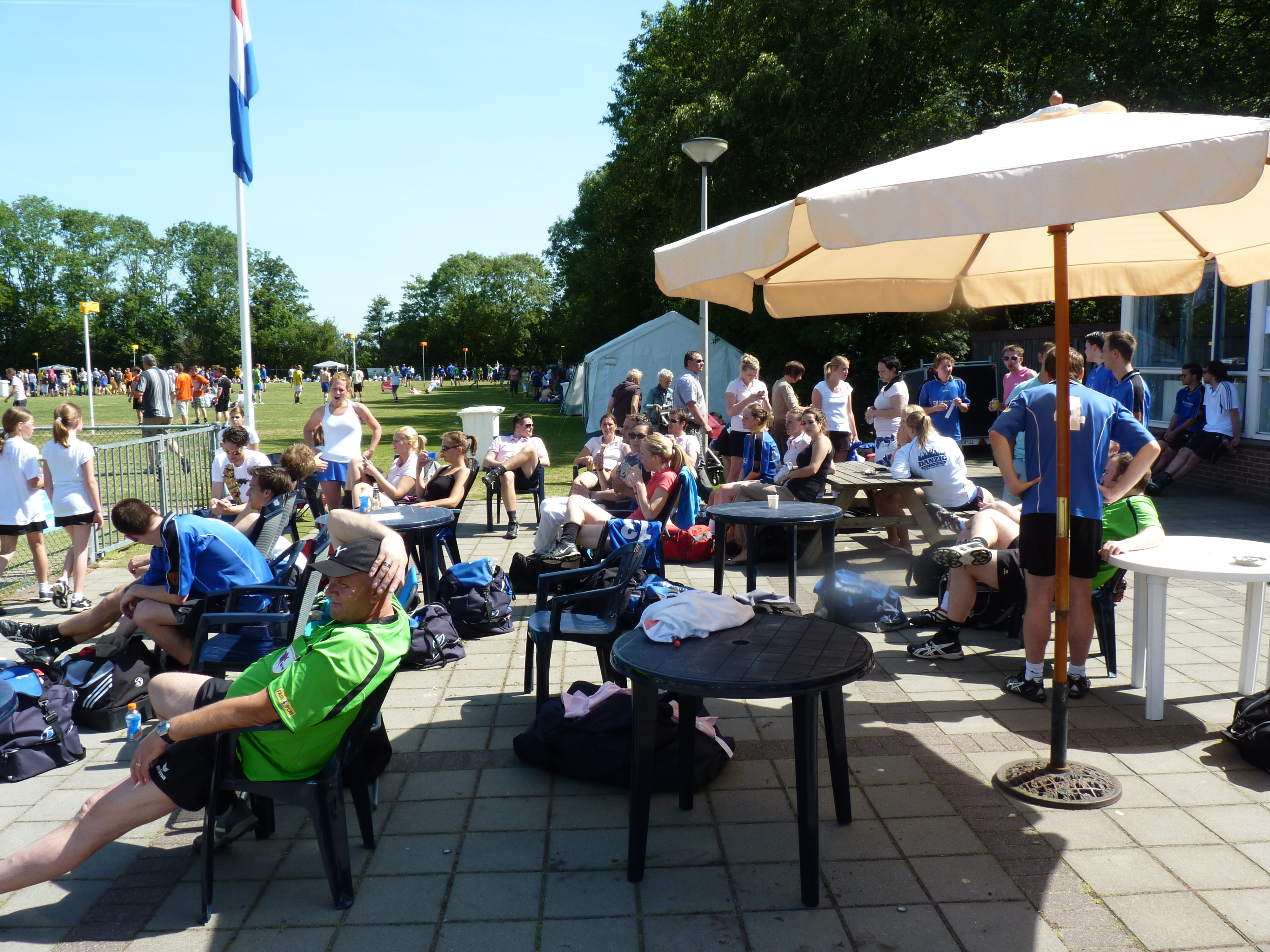 Overzichtsfoto van het jaarlijkse Hemelvaartsdagtoernooi van c.k.v. VEO te Voorburg